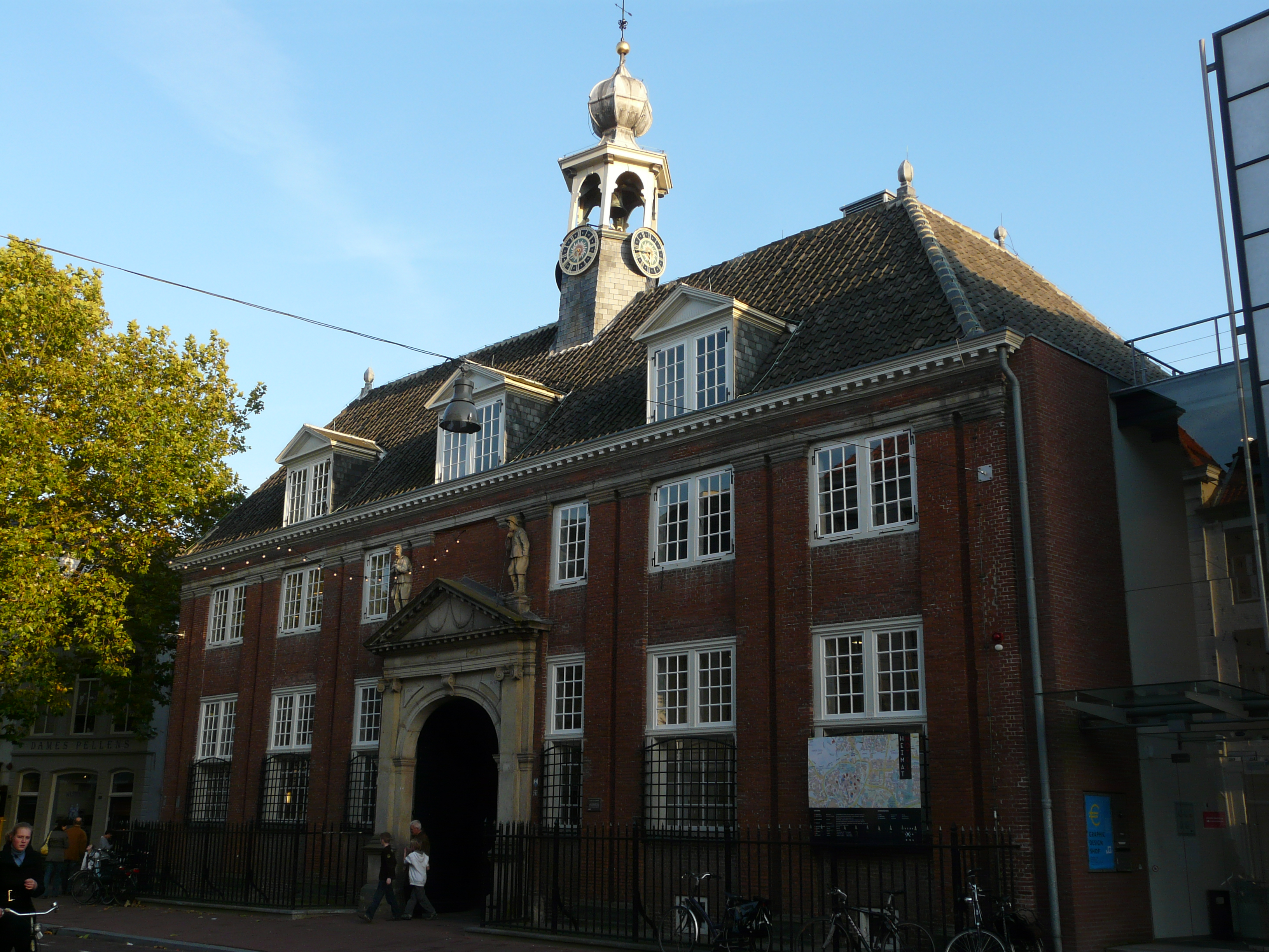 Oude Mannenhuis {Graphic Design Museum} in de Boschstraat in Breda Centrum in Breda